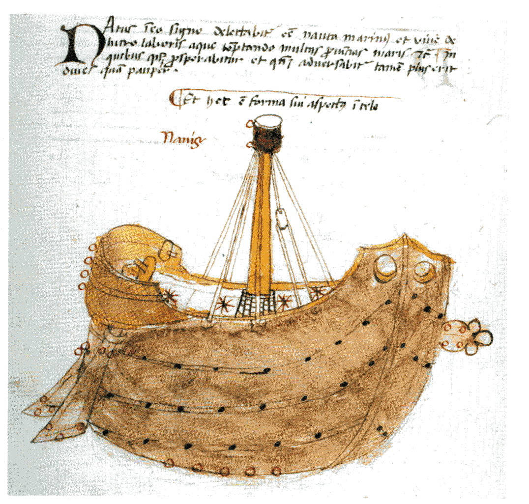 Argo navire offert par Athéna à Jason et aux argonautes.